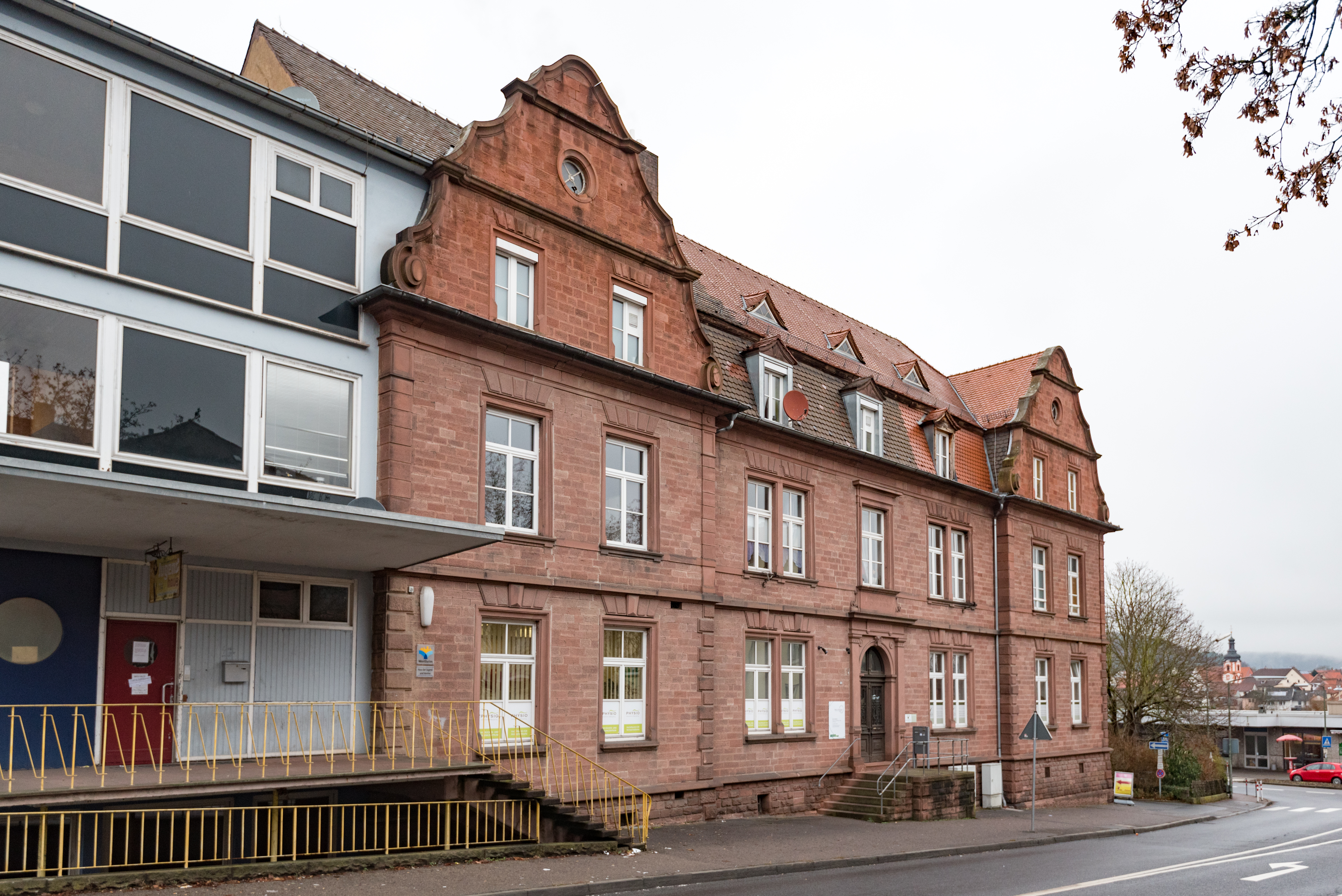 Wertheim, Lusisenstraße 2